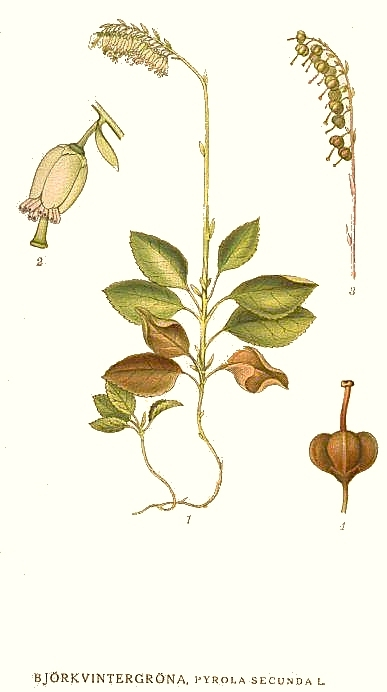 Orthilia secunda (L.) House, syn. Pyrola secunda L. Original Description Björkvintergröna, Pyrola secunda L.